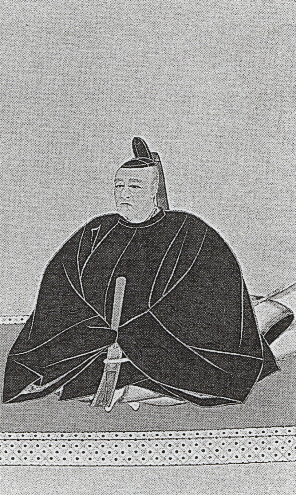 鍋島直紀の肖像(モノクロ)。